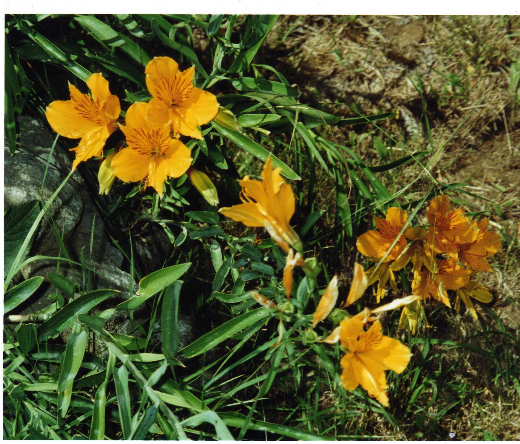 Flores amancay, en Bariloche, Argentina